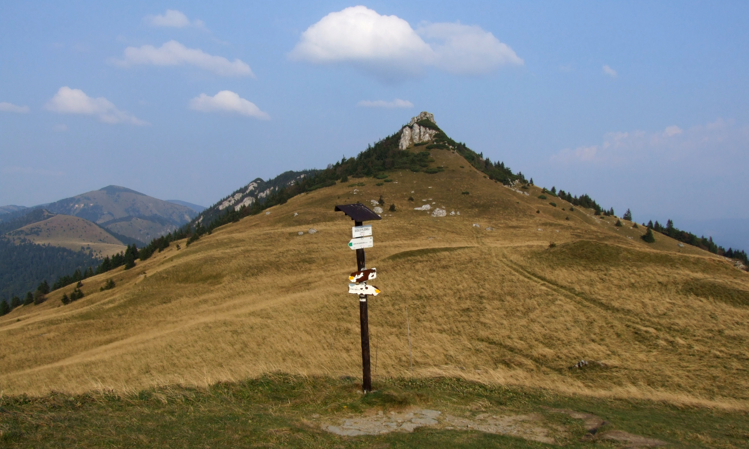 Sedlo Ploskej a Čierny kameň, Veľká Fatra